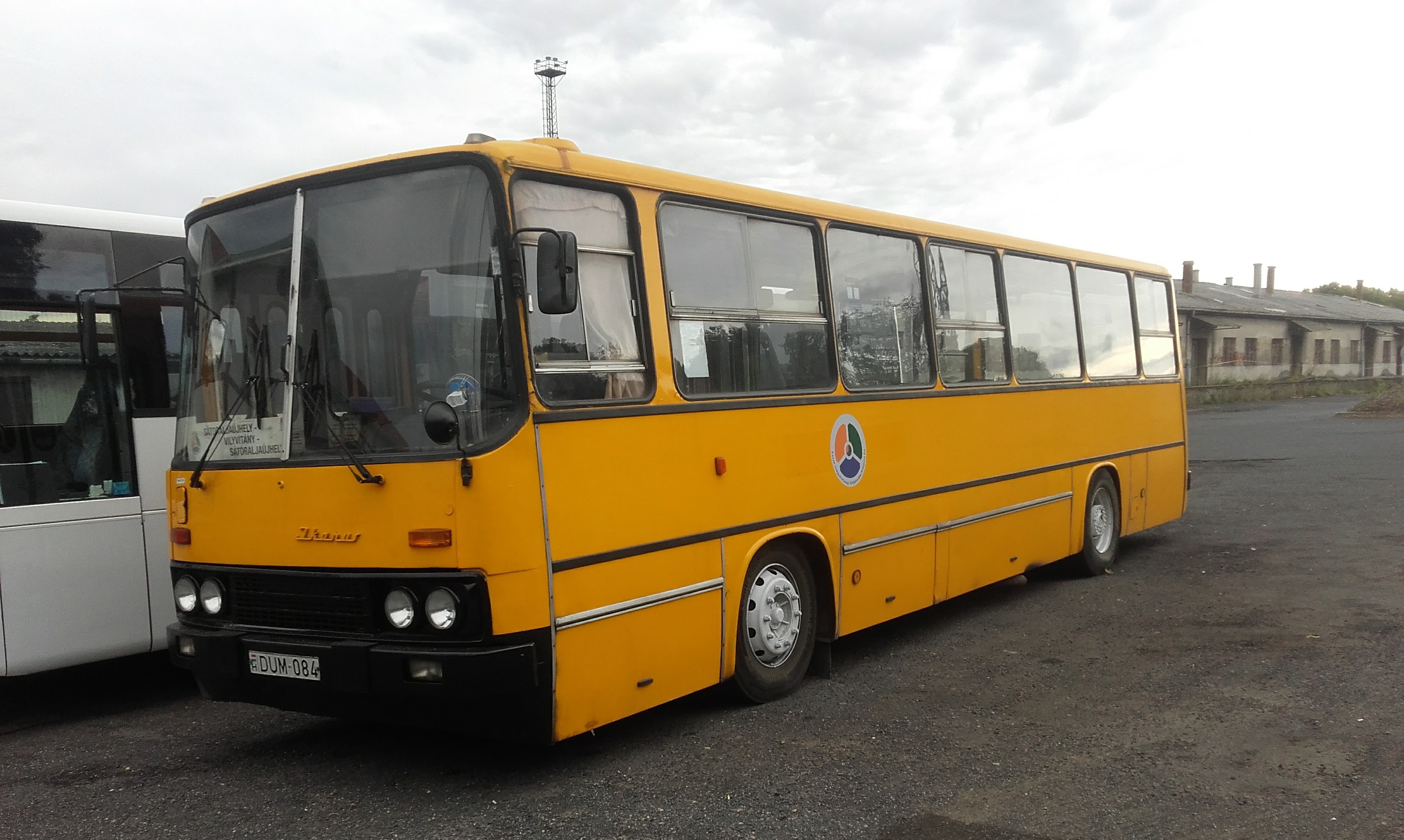 Az ÉMKK DUM-084 rendszámú Ikarus 260 típusú busza Sátoraljaújhelyen, a 3900-as helyközi járaton.